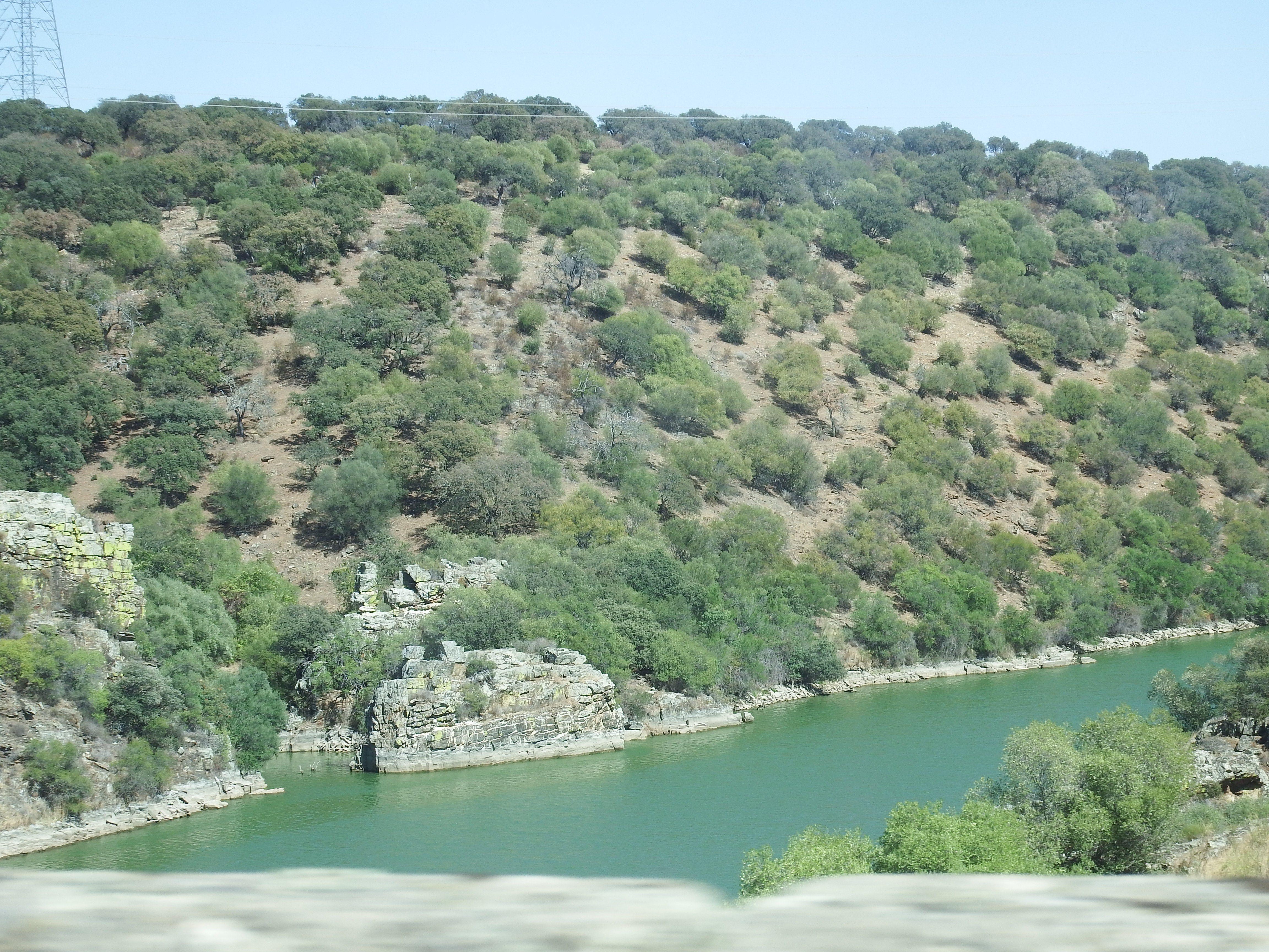 Antigua NV en la zona de Romangordo y Almaraz, Cáceres